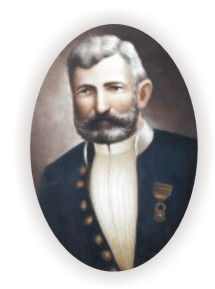 Jean Marie Marcelin Gilibert (1839-1923), militaire français, créateur et premier directeur de la police nationale colombienne